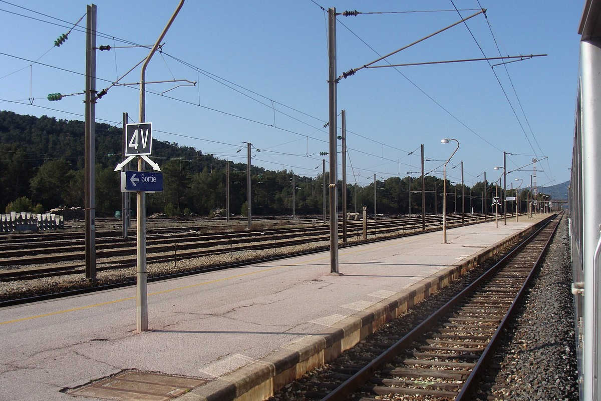 En gare de Carnoules, les voies paires et le quai central ; sur la gauche les voies de desserte marchandises.